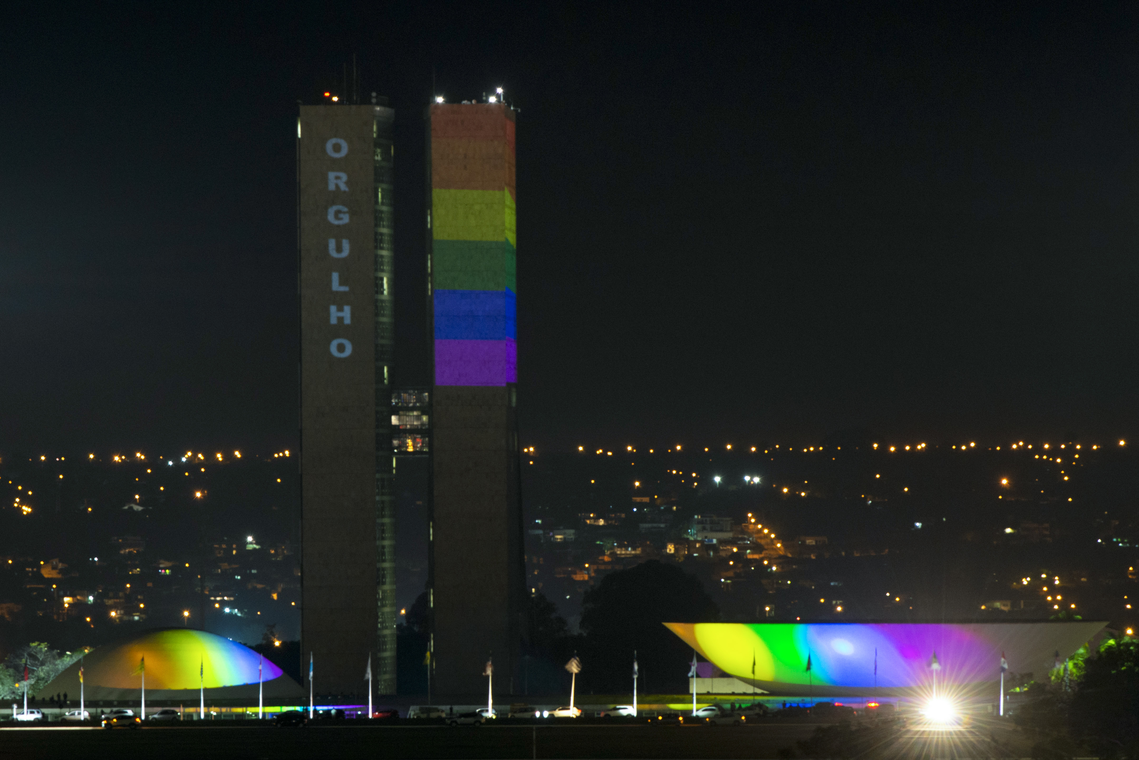 As cores do arco-íris foram projetadas no edifício do Congresso Nacional neste domingo (28), das 20h às 20h15, para lembrar o Dia Internacional do Orgulho LGBTI. A projeção ficou por conta do Brasília Orgulho, coletivo responsável pela organização das atividades para celebrar a data na cidade, a exemplo da Parada LGBTI, que este ano não será realizada devido à pandemia do novo coronavírus. Senador Fabiano Contarato (Rede-ES) é o autor da iniciativa. Foto: Leopoldo Silva/Agência Senado